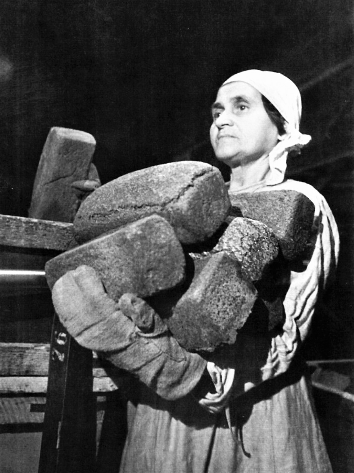 Рабочая хлебозавода № 61 имени А.Е. Бадаева Эмилия Чибор укладывает хлеб в ящики для отправки в магазин в блокадном Ленинграде